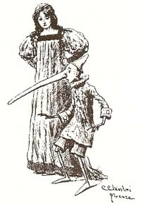 Pinocchio dice una bugia e si allunga il suo naso. Illustrazione di Carlo Chiostri (1863 - 1939) dal libro di Collodi "Le avventure di Pinocchio", 1901